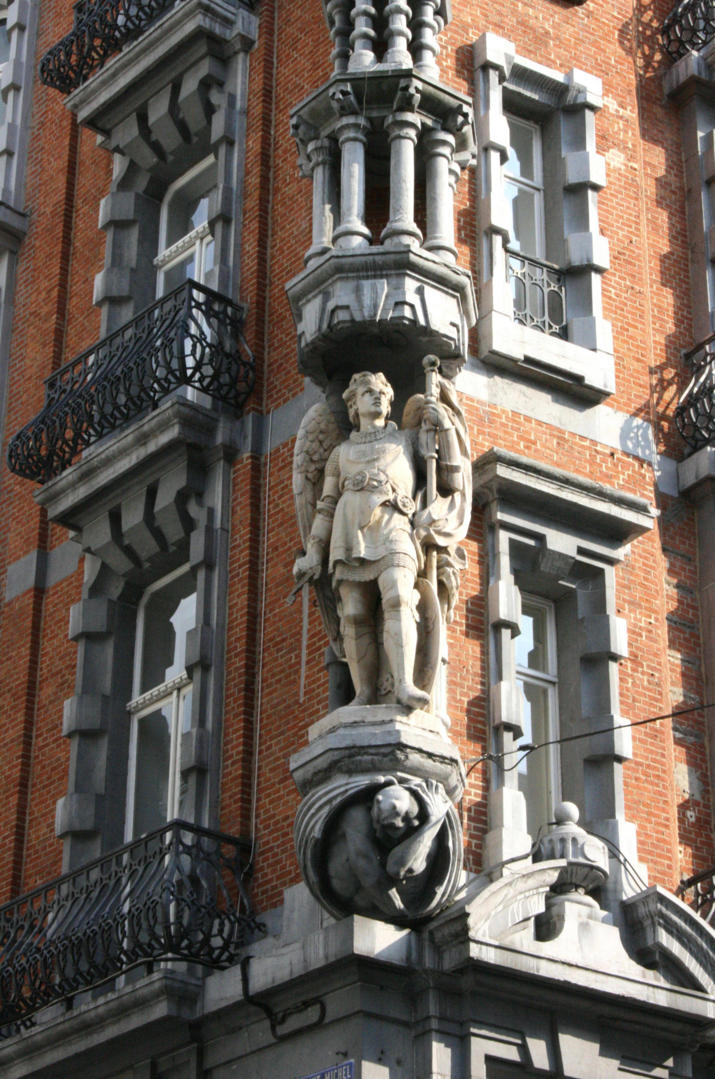 Boulevard Adolphe Max 11-17, Bruxelles, Belgique. Détail : statue de Saint-Michel par Albert Desenfans